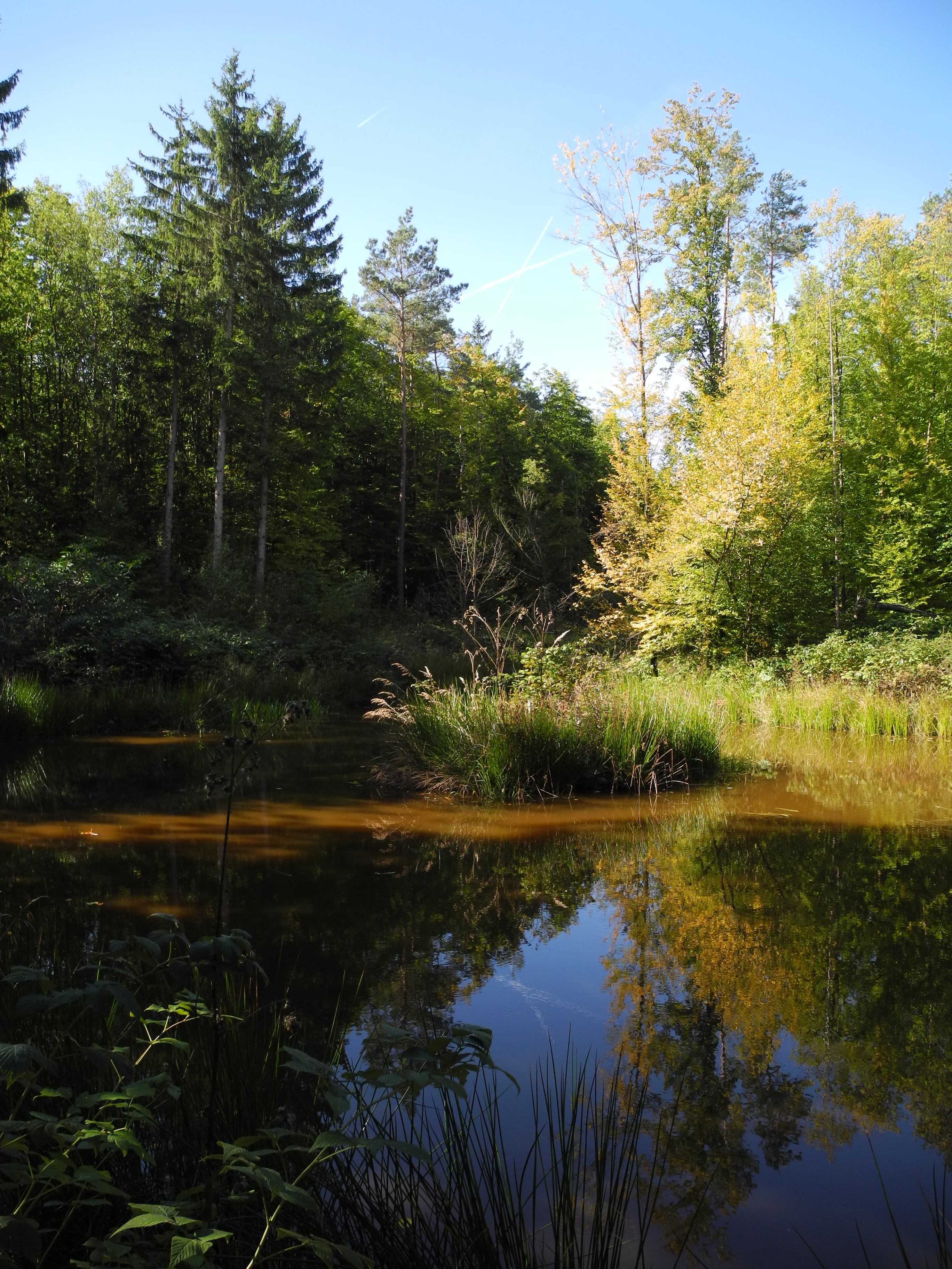 Naturpark Steigerwald, Teich mit Schilf